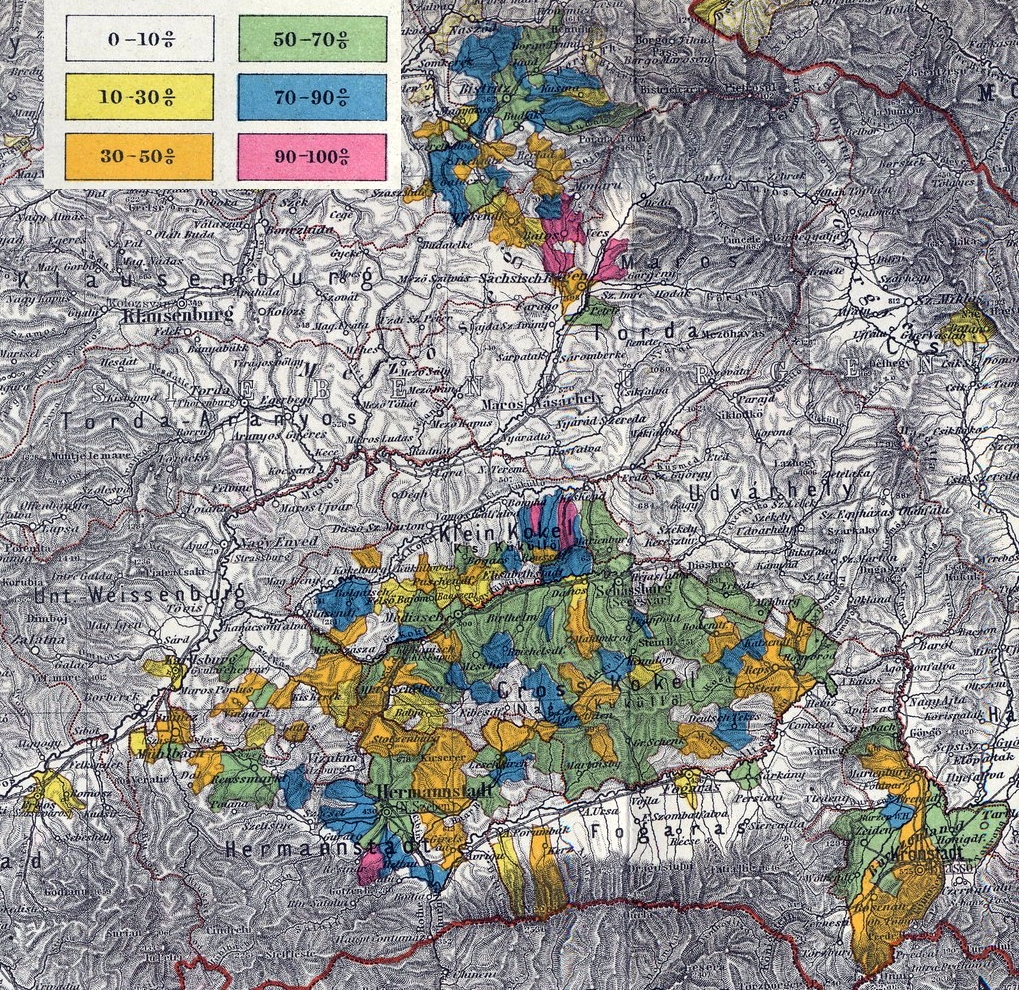 Die Sachsen in Siebenbürgen. Volkszählung 1890.